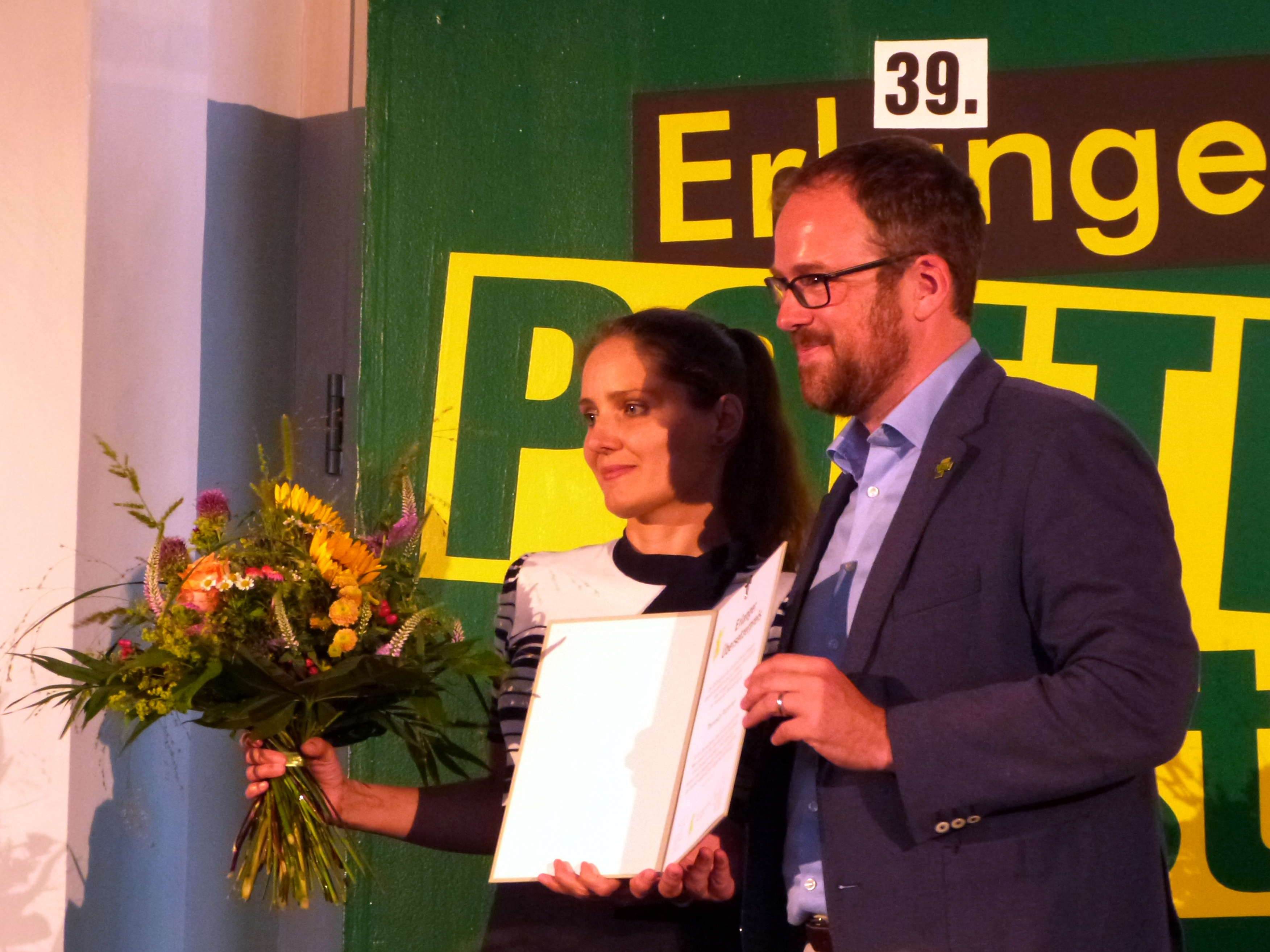 Theresia Prammer und der Erlanger Oberbürgermeister Florian Janik 2019 bei der Verleihung des "Erlanger Literaturpreis für Poesie als Übersetzung".